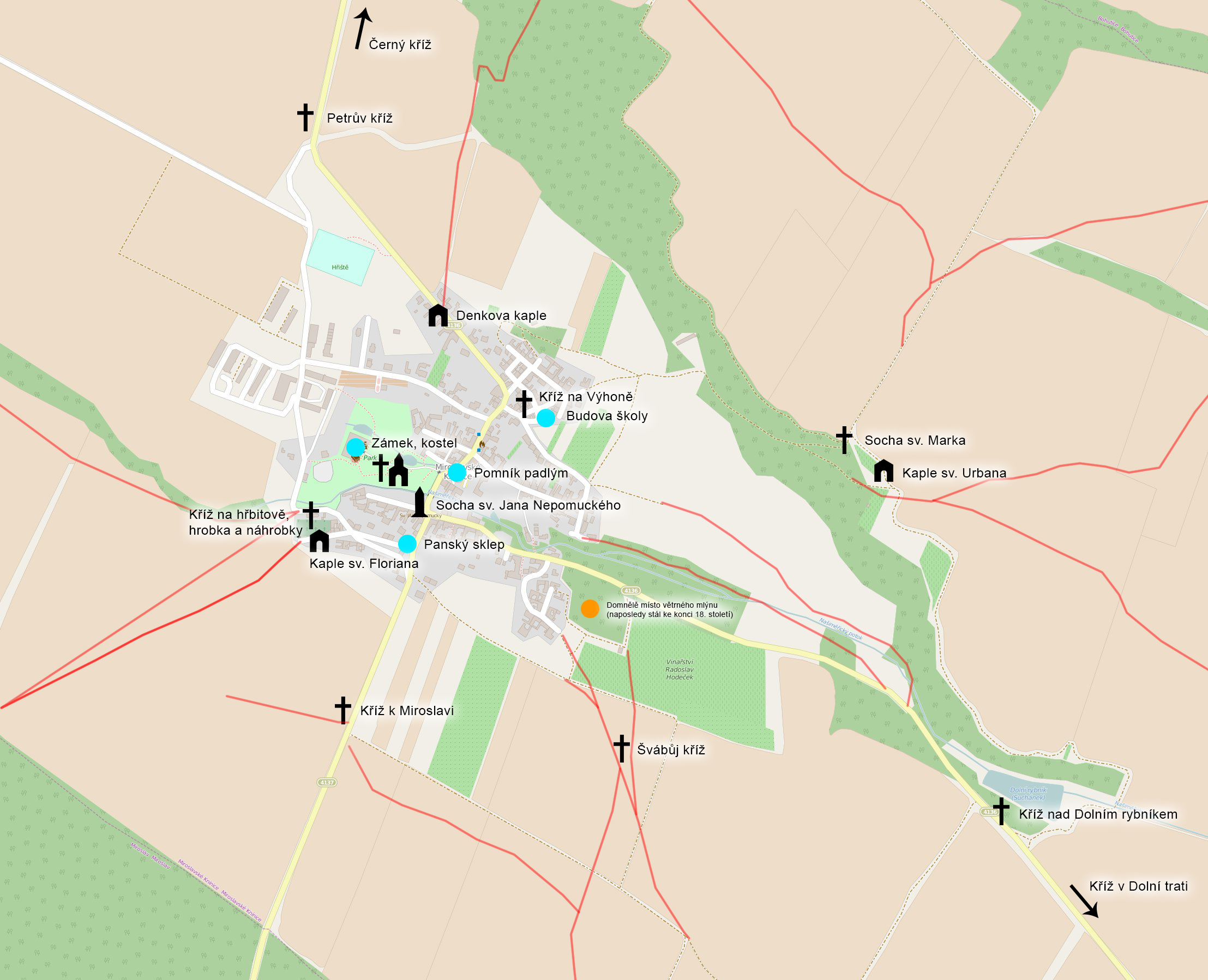 Památky v Miroslavských Knínicích na mapě. Červeně jsou vyznačeny zaniklé cesty. This map of Miroslavské Knínice was created from OpenStreetMap project data, collected by the community. This map may be incomplete, and may contain errors. Don't rely solely on it for navigation.